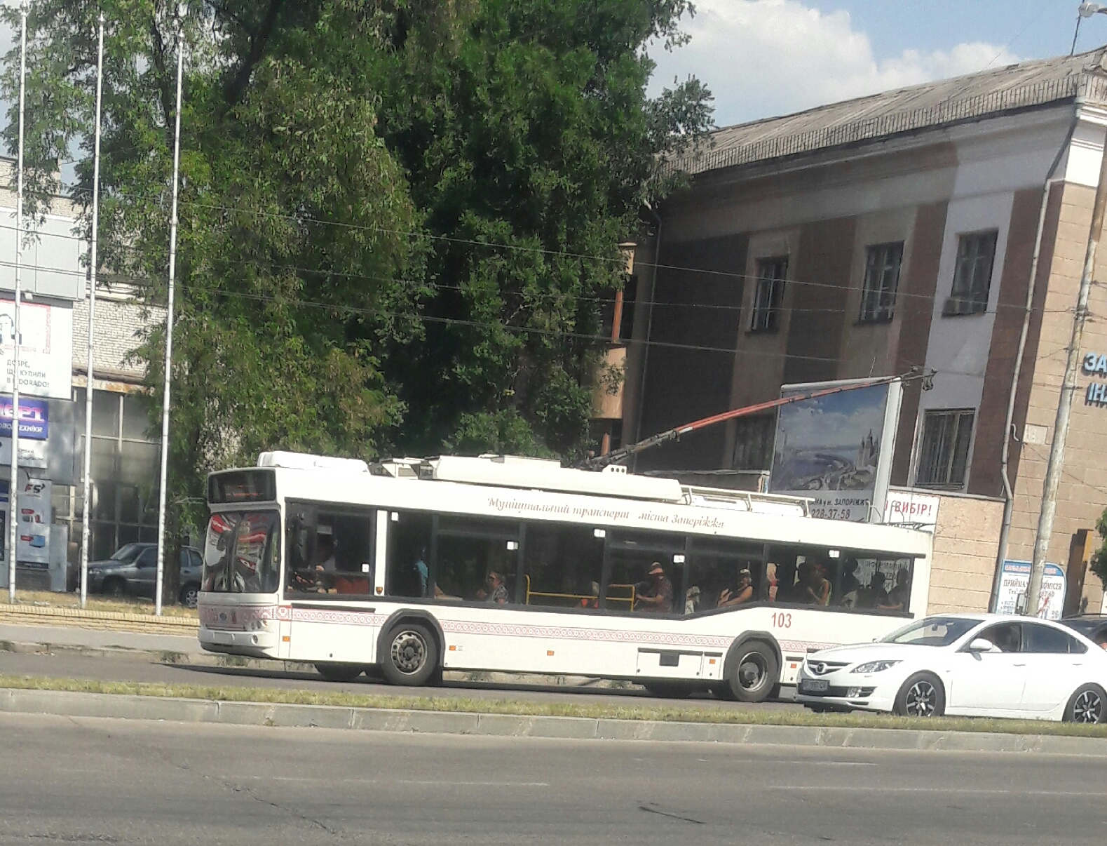 Запоріжжя, проспект Соборний. Тролейбус «Дніпро Т103» (№ 103) на маршруті № 3.